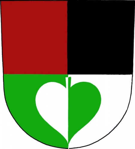 znak, Dírná, okres Tábor